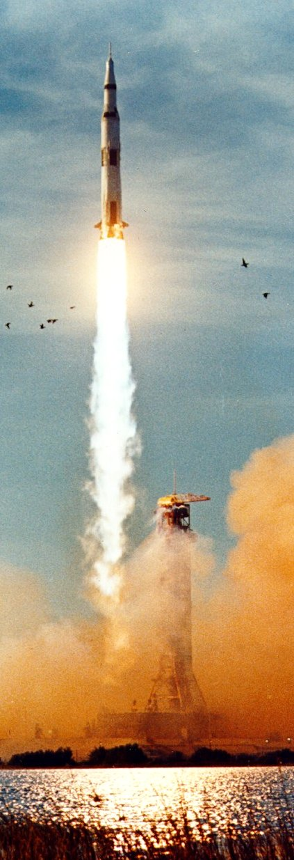 Apollo 8 Start am 21. Dezember 1968